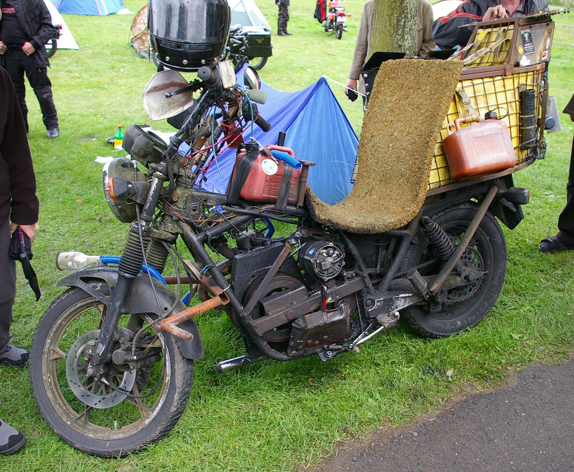 Diesel-Ratbike aus Schweden, ist in dieser Konstellation auf eigener Achse angereist.